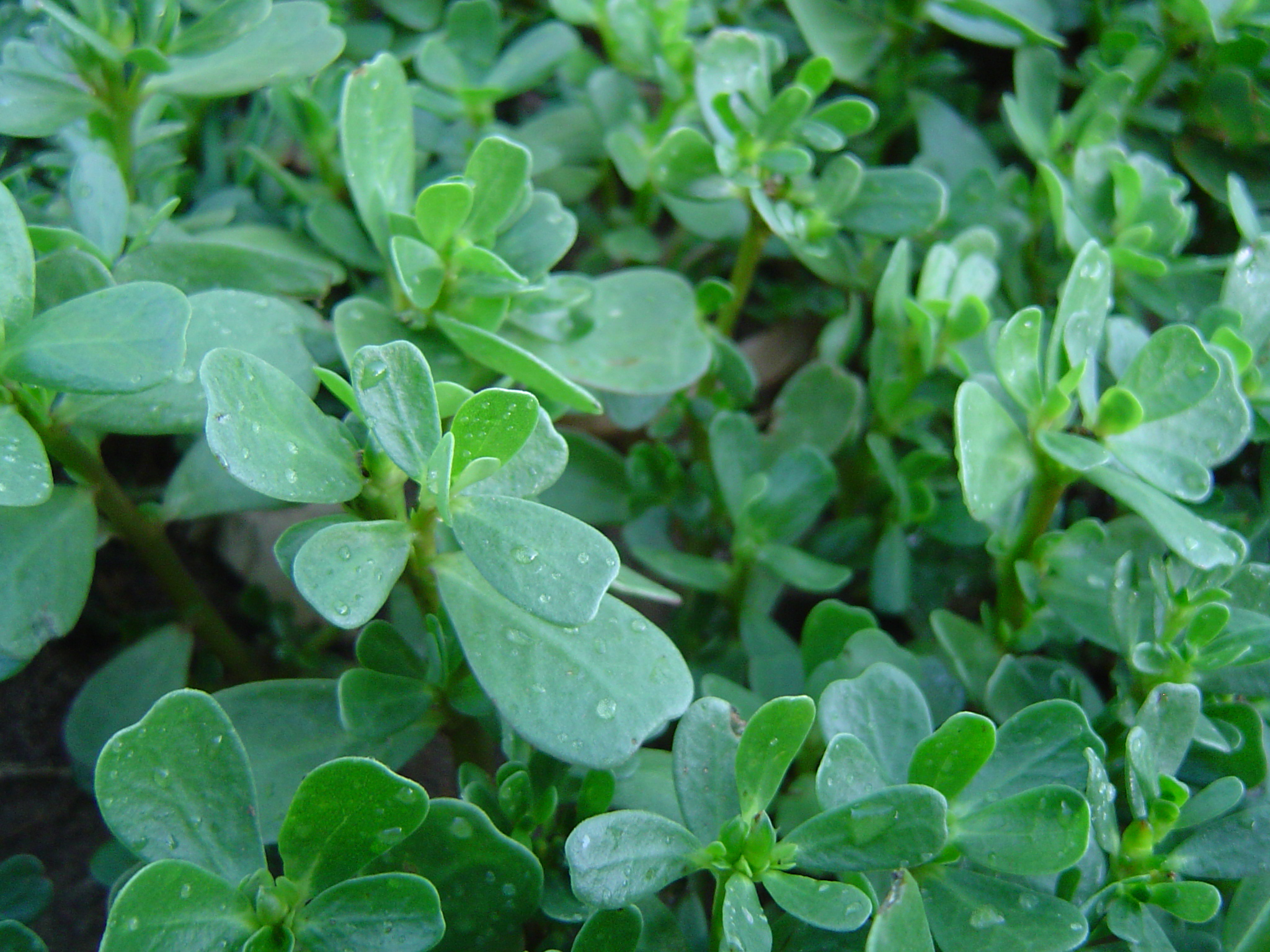 Photo faite le 20/08/2006 à Reynies 82370 (France). Auteur : Olivier LOUIS (leluis)